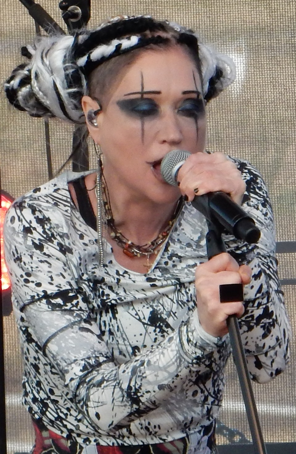 Linda auf den Deutsch-Russischen Festtagen in Berlin-Karlshorst 2015